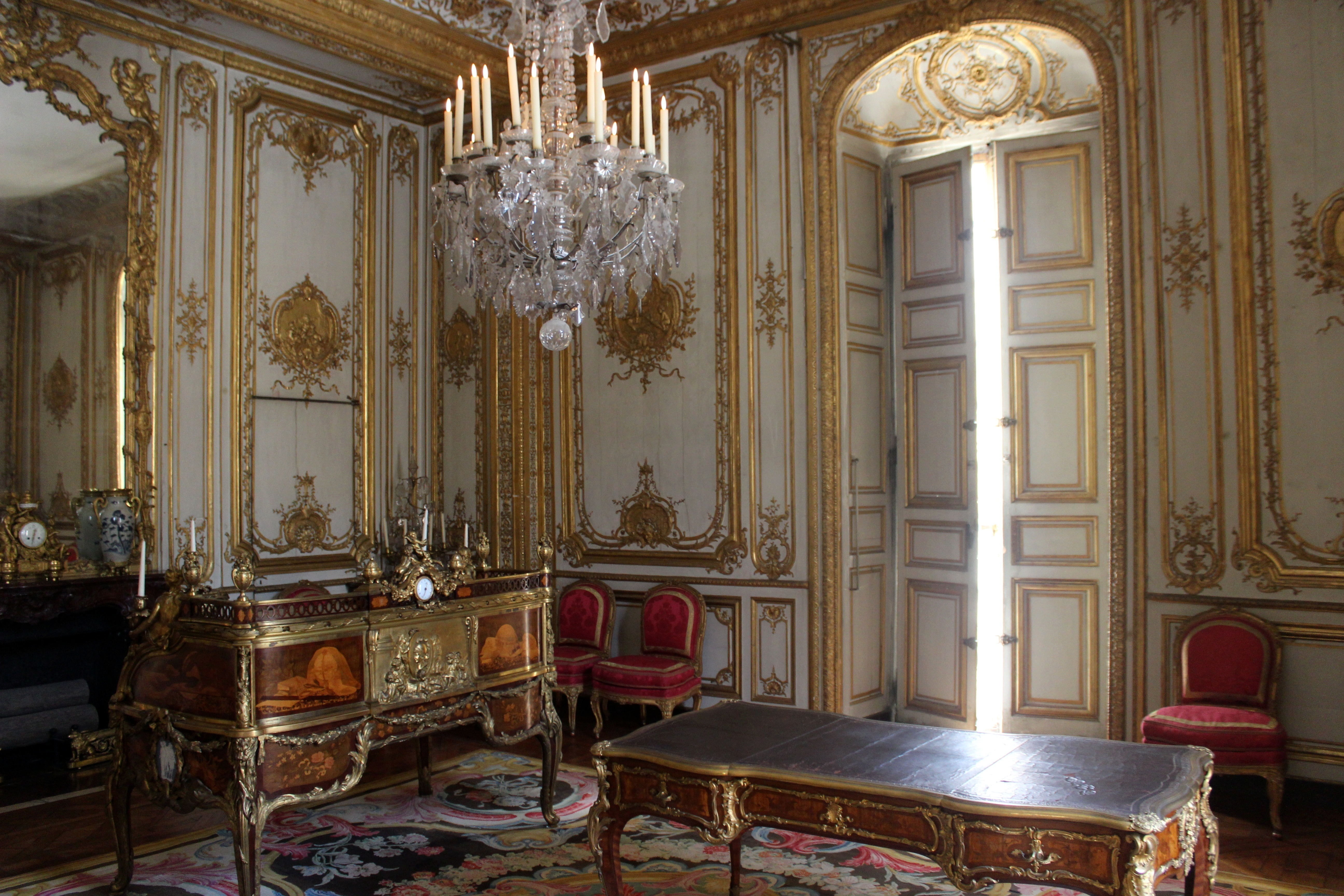 Château de Versailles, Cabinet intérieur du Roi. .